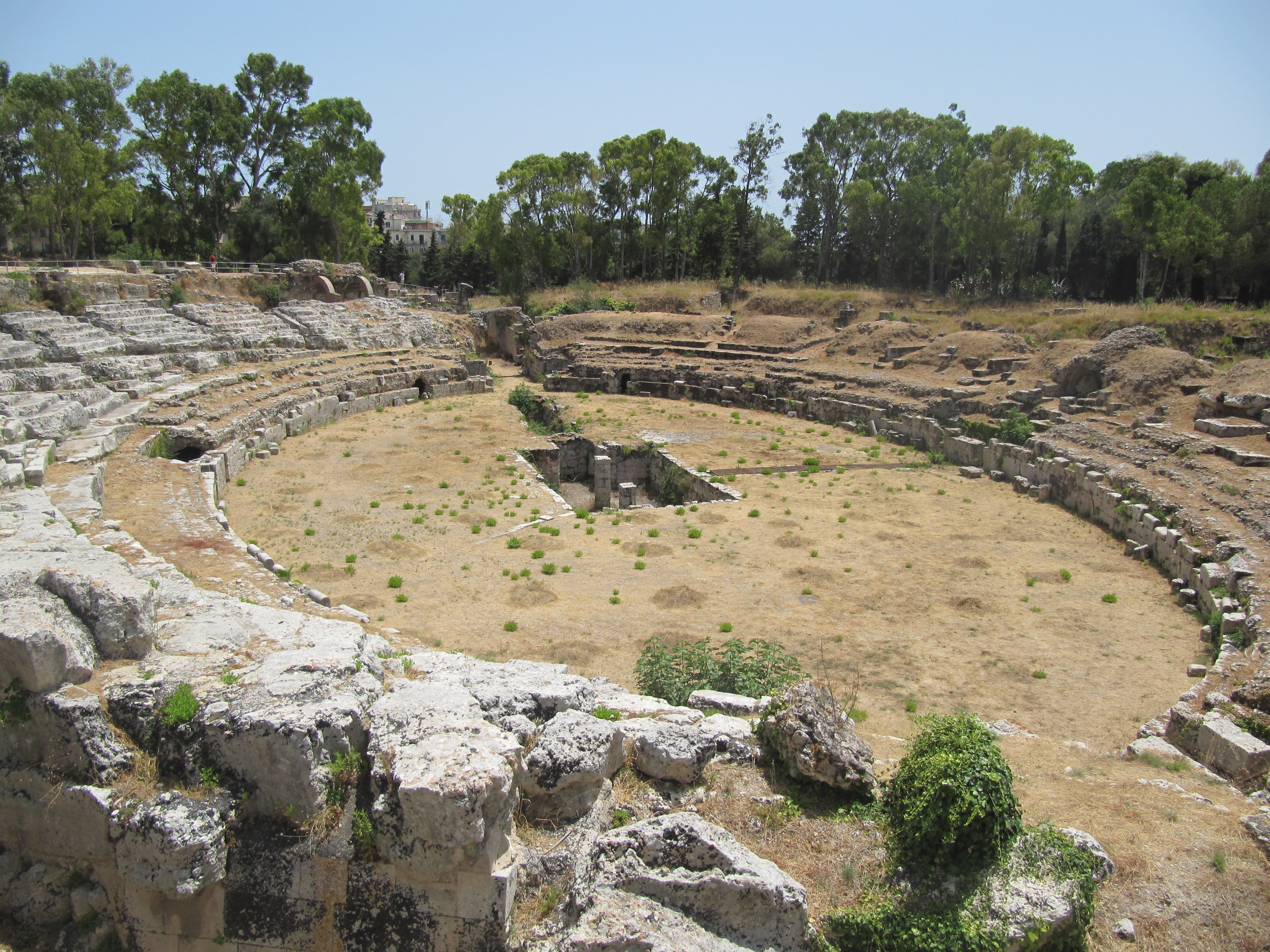 Siracusa, Sicilia. Anfiteatro Romano.